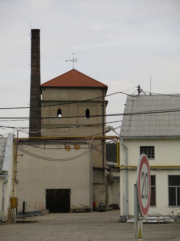 Slévárna, Sedlec, Sedlec (Starý Plzenec).